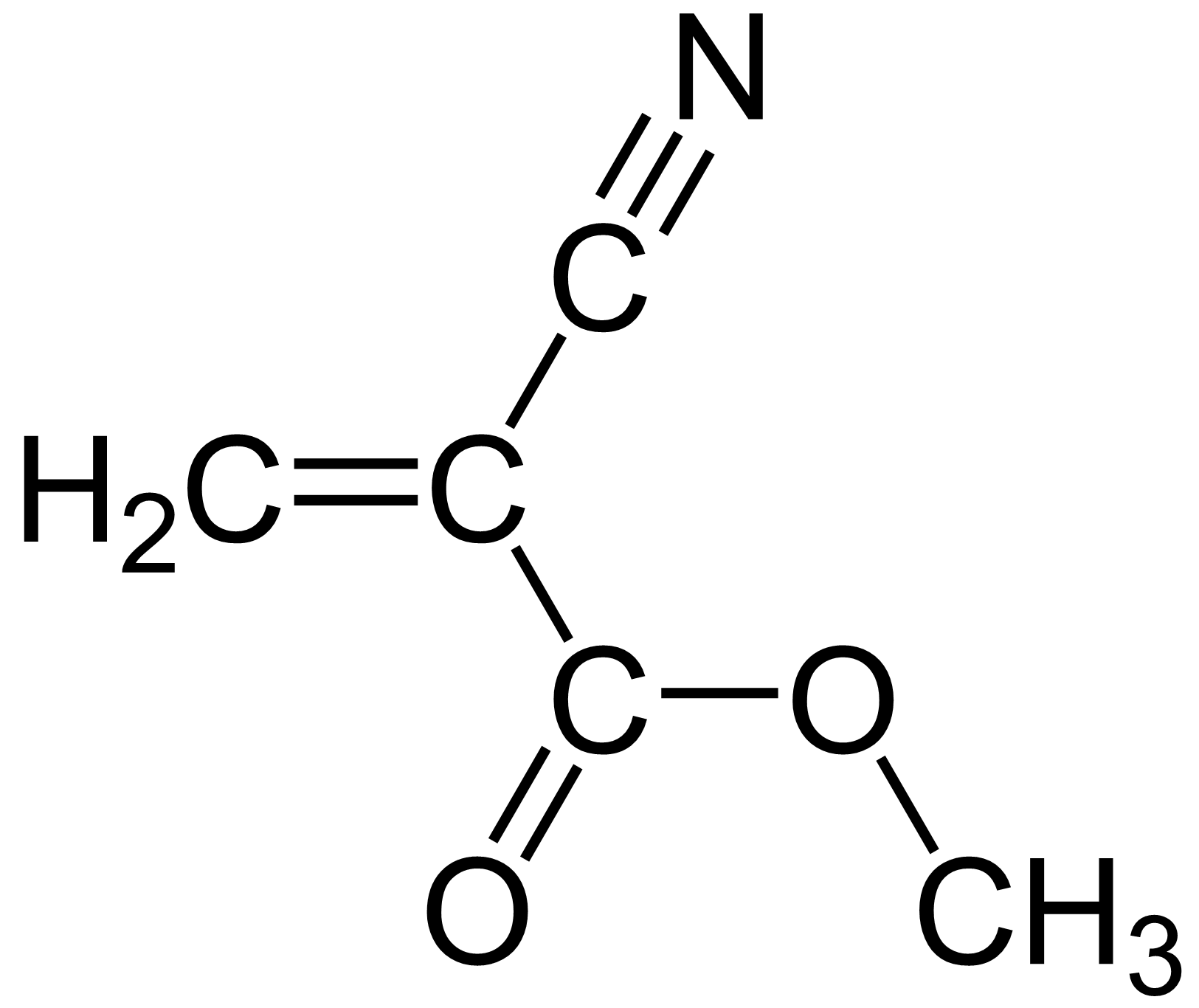 Cyanoacrylate structural formula